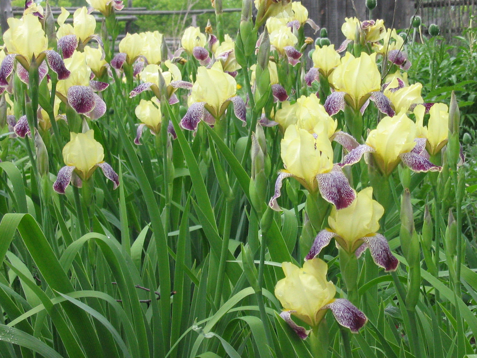 Ирисы